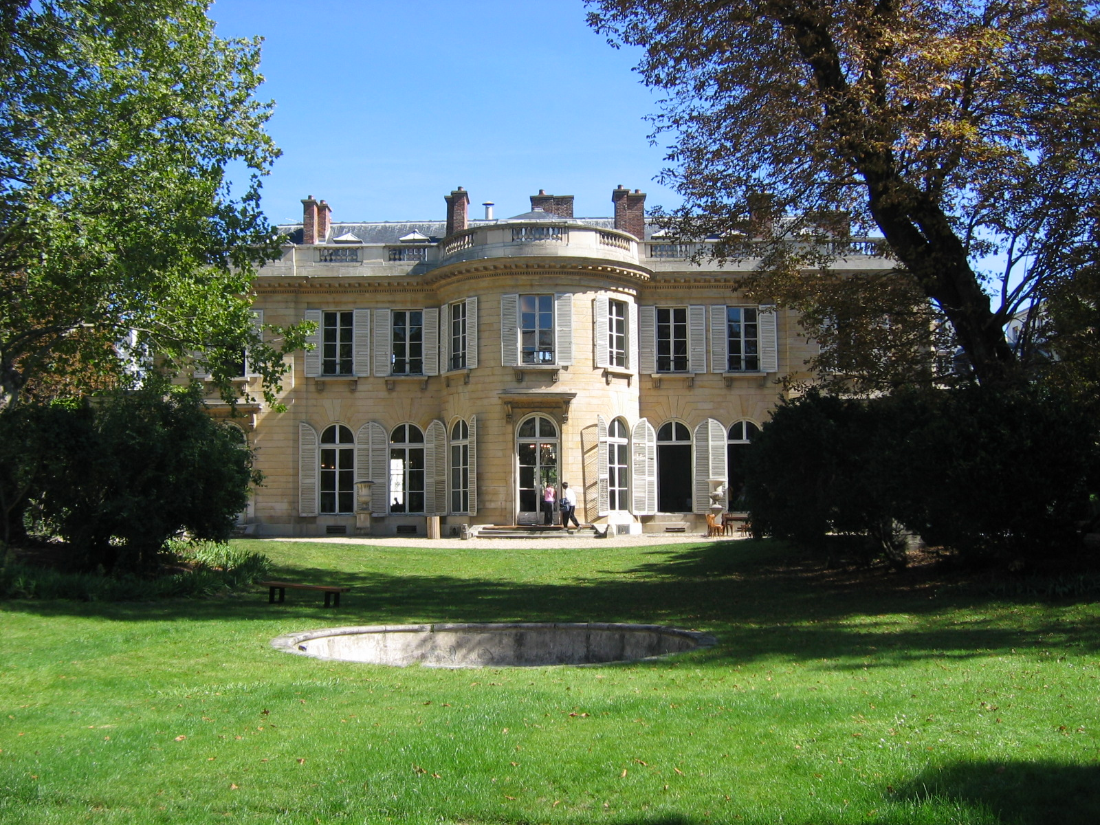 L'hotel de Mademoiselle de Condé dans le 7ème arrondissement de Paris. Côté Jardin. Photo prise à l'occassion des journées du Patrimoine.